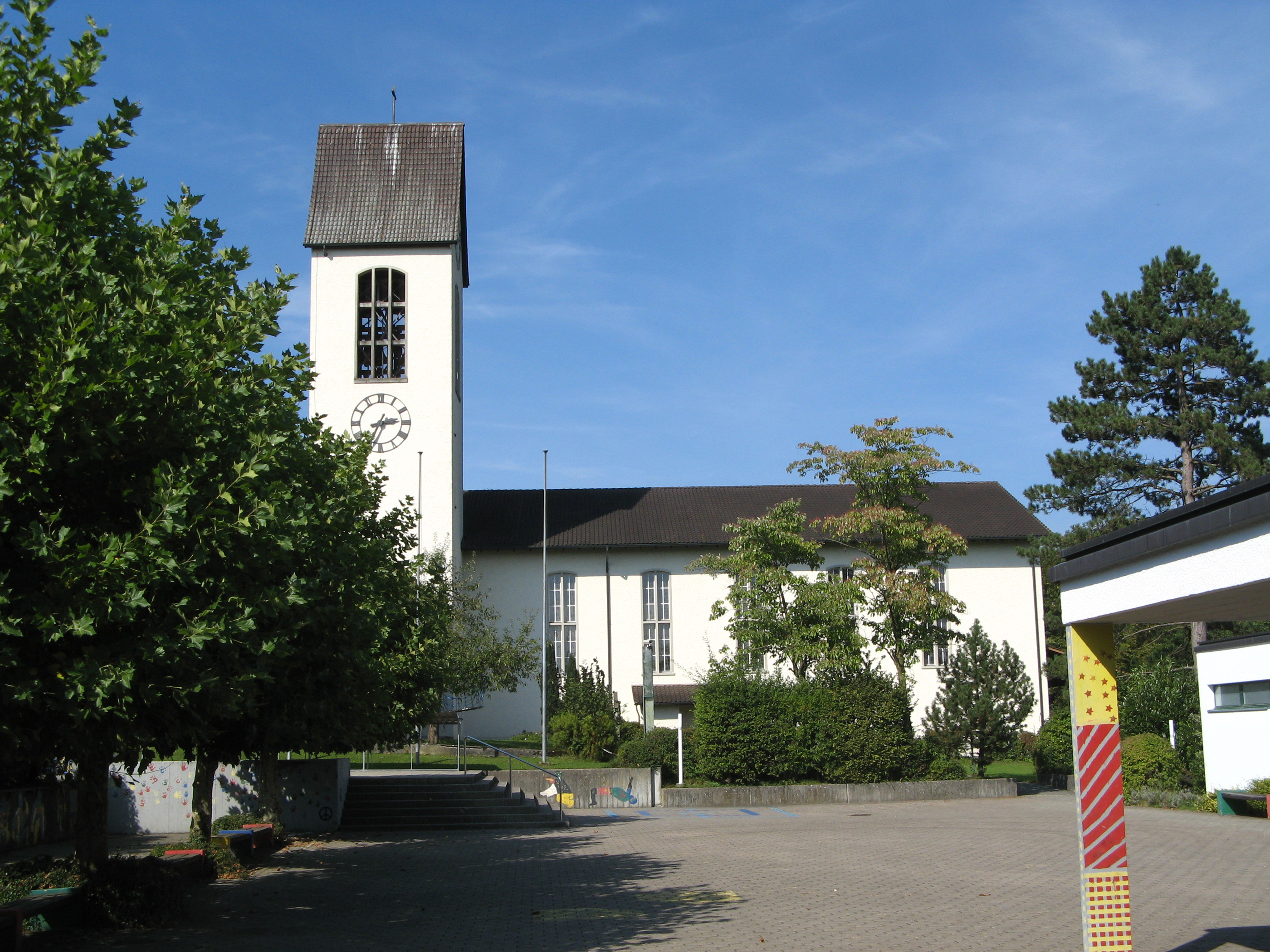 Aussenansicht der Pfarrkirche St. Wendelin in Aristau, ID 909